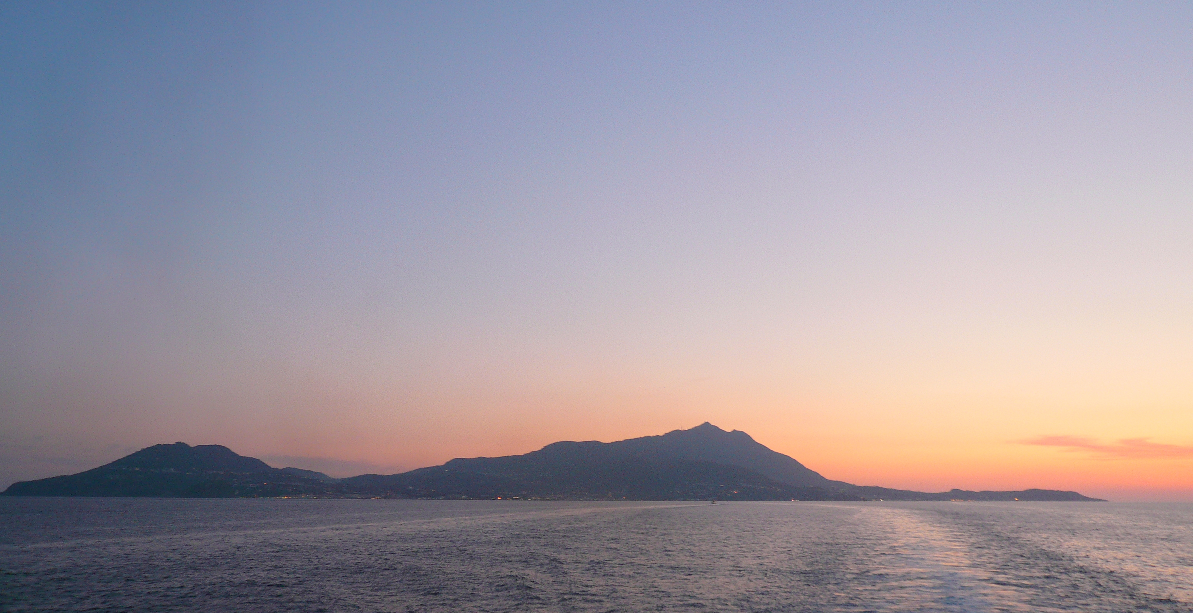 l'isola d'Ischia vista dal traghetto diretto a Napoli